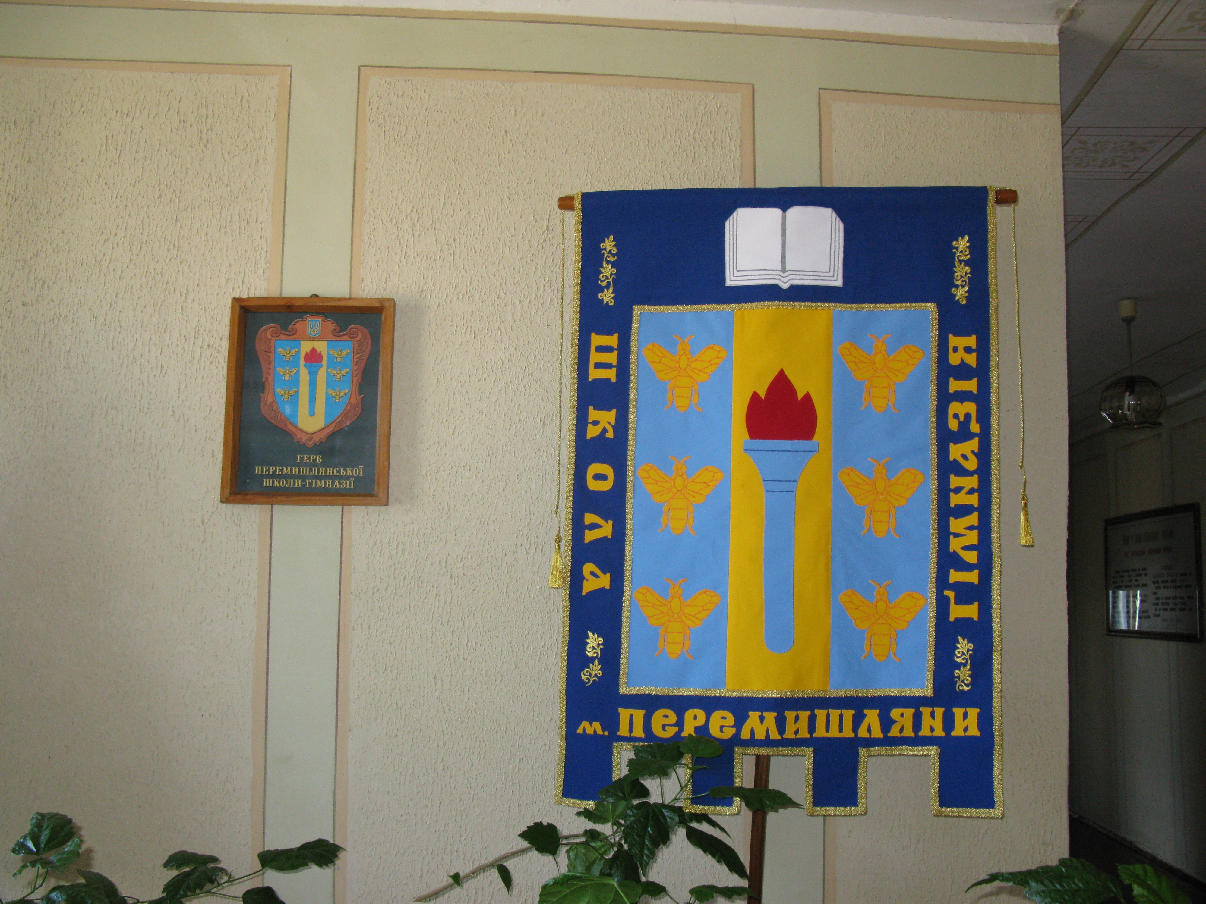 символи школи - гімназії